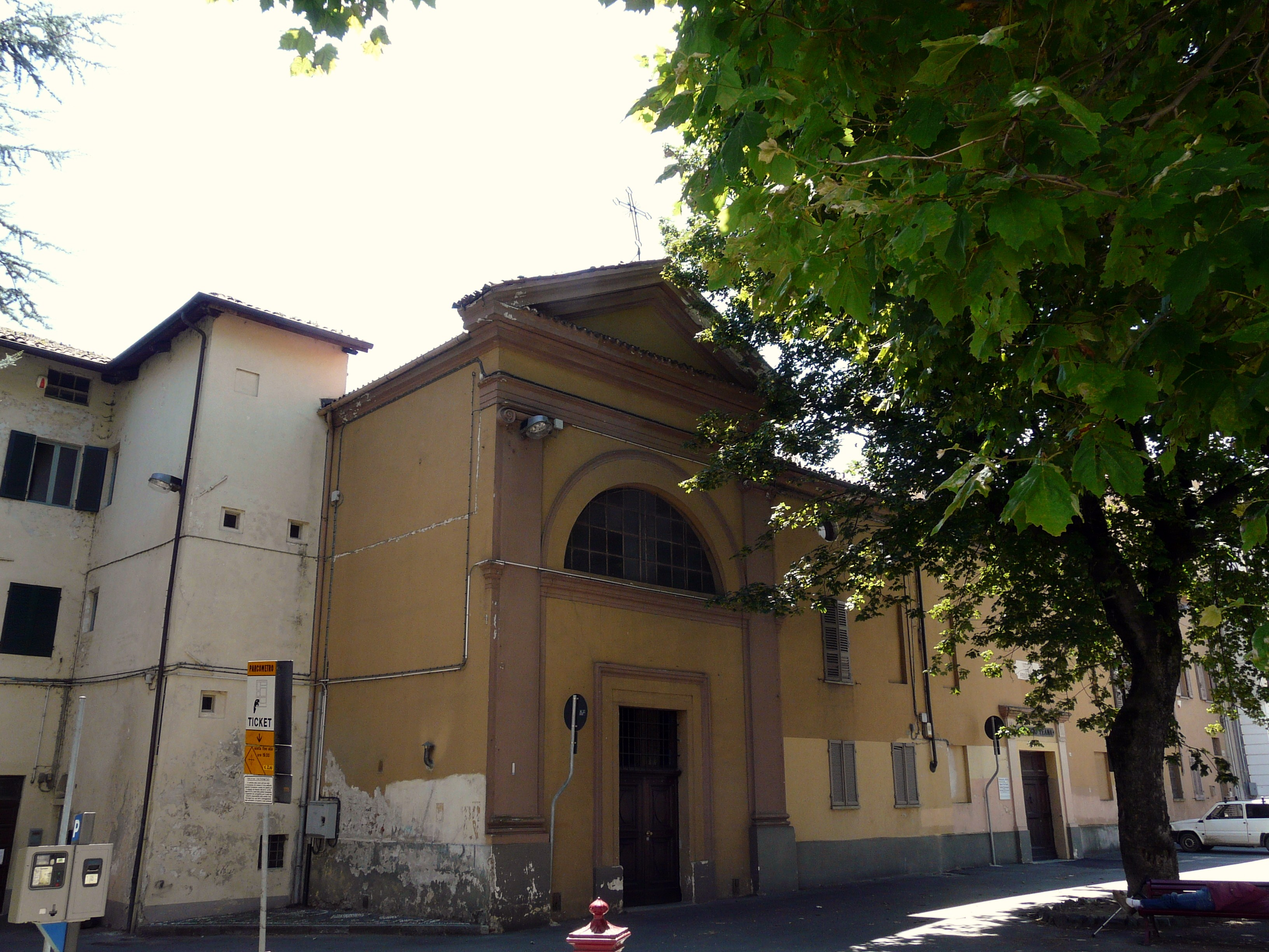 Palazzo del Vescovado, Ivrea, Piemonte, Italia